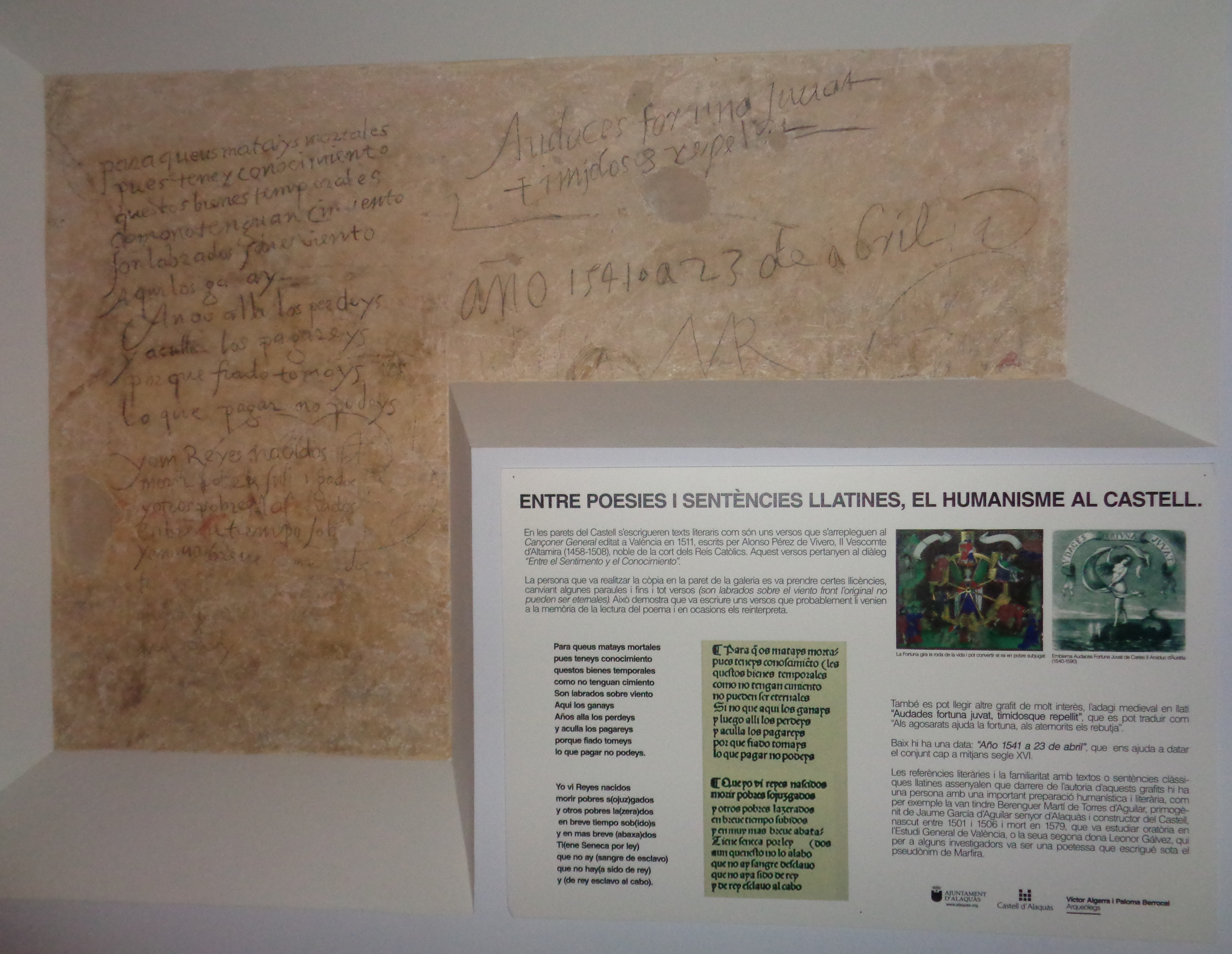 Interior del castell d'Alaquàs.